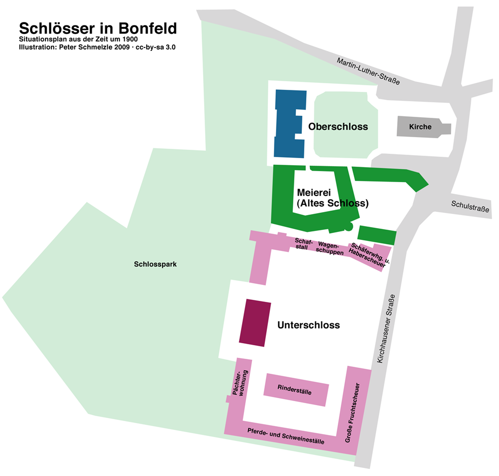 Schlösser in Bonfeld um 1900, nach historischem Kartenmaterial